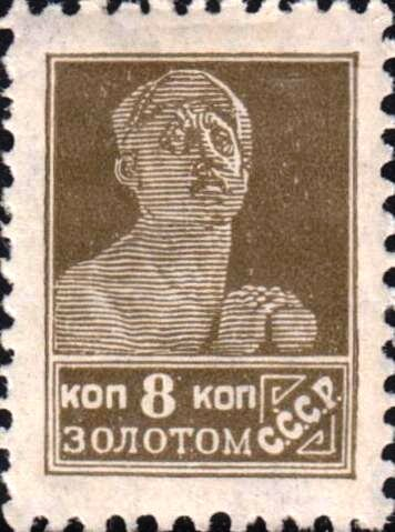 Почтовая марка СССР Стандартный выпуск. Рабочий